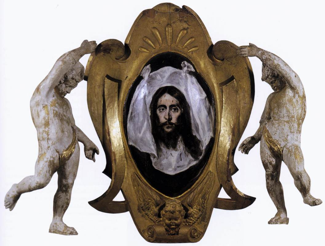 Santa Faz de El Greco para el Convento de Santo Domingo el Antiguo de Toledo